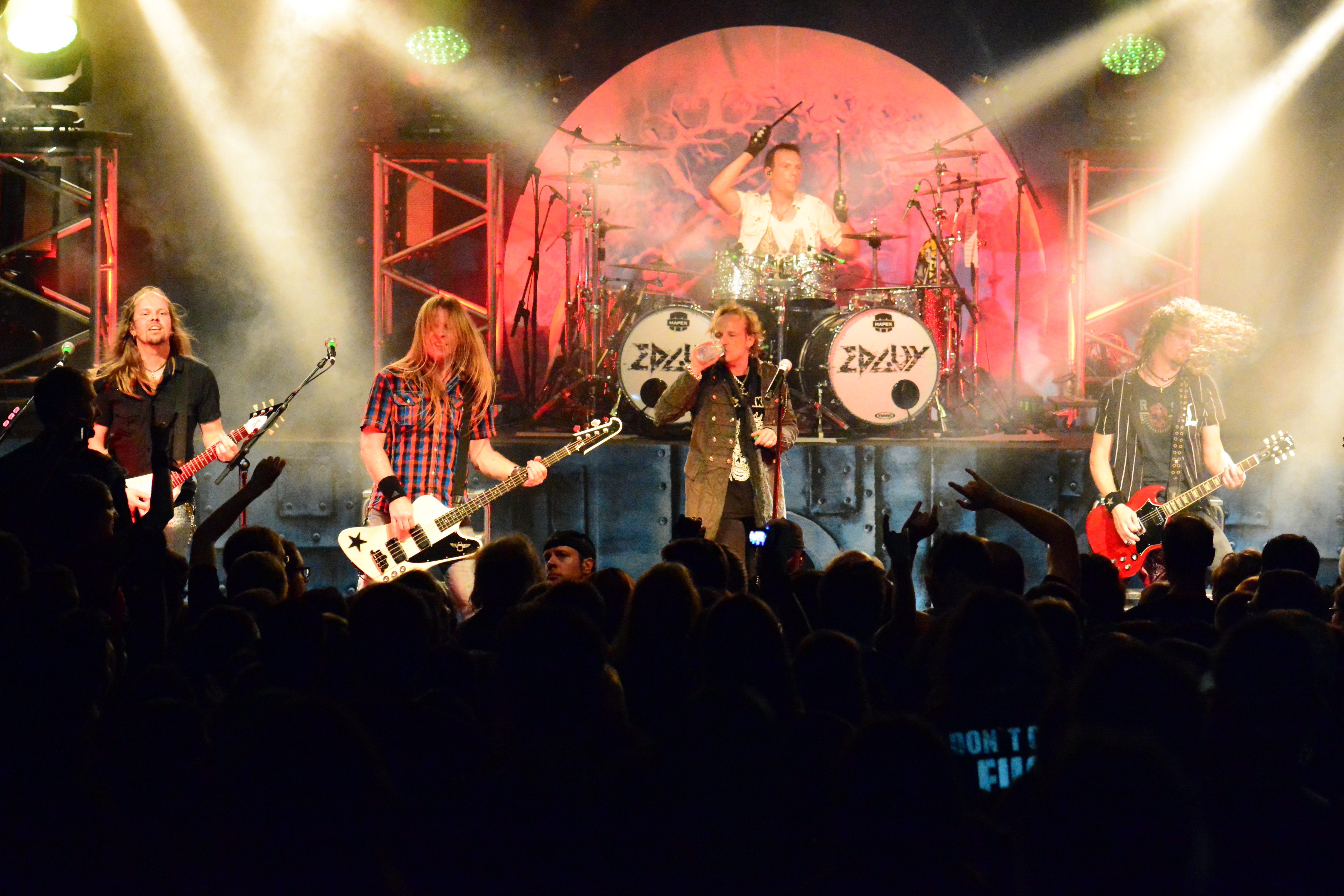 Edguy bei den Hamburg Metal Dayz 2014